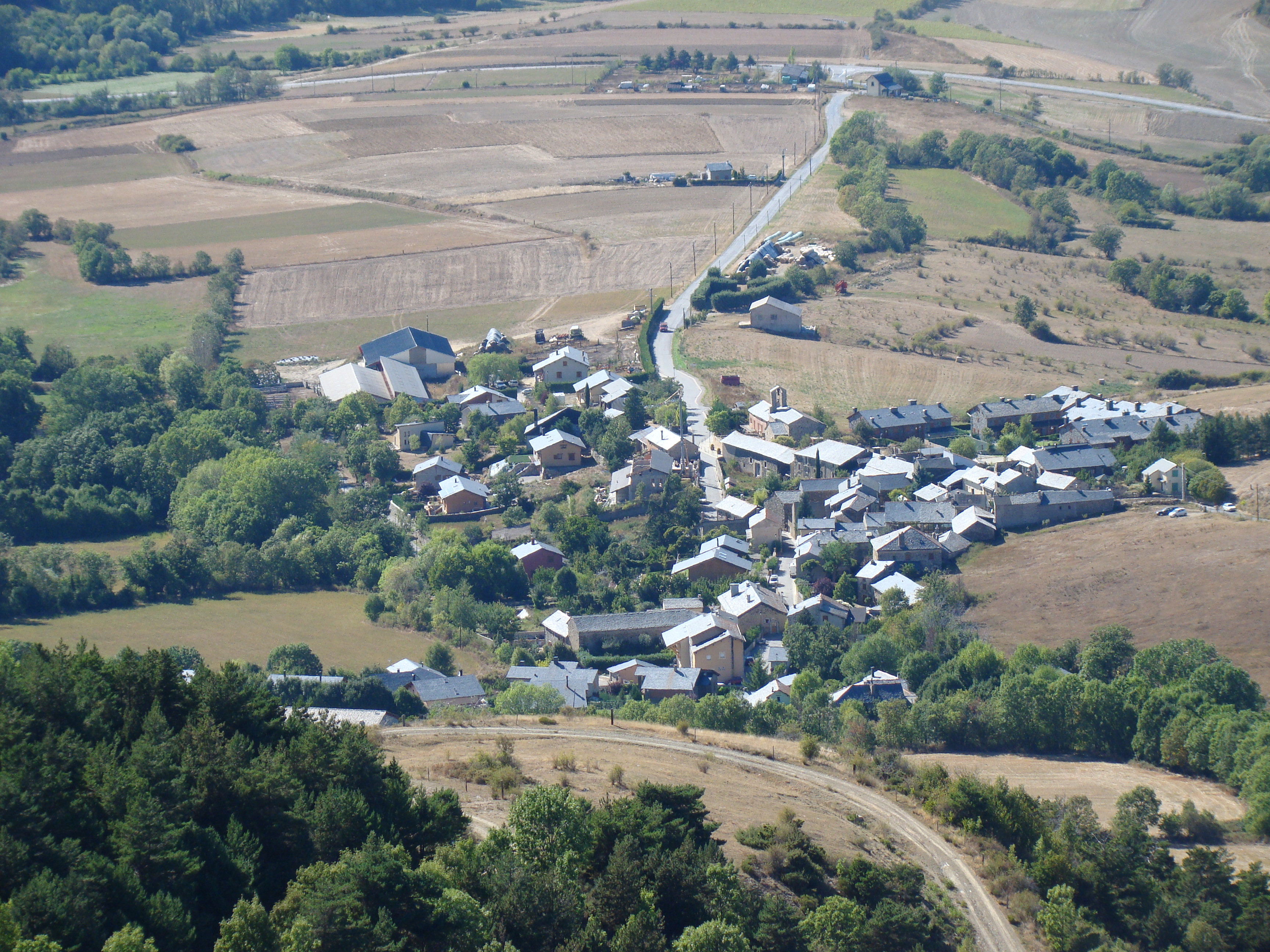 Poble de Naüja, a l'alta Cerdanya.